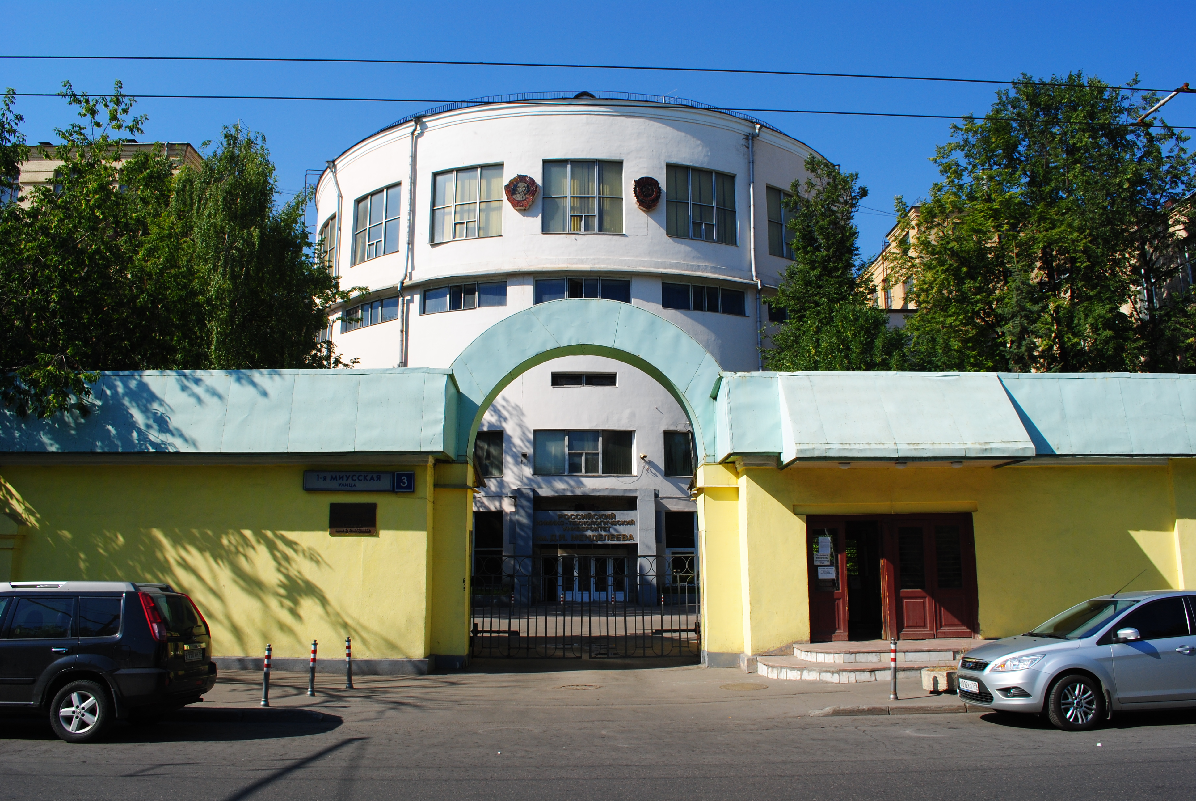 РХТУ им. Д. И. Менделеева, проходная и Главный корпус Миусского комплекса